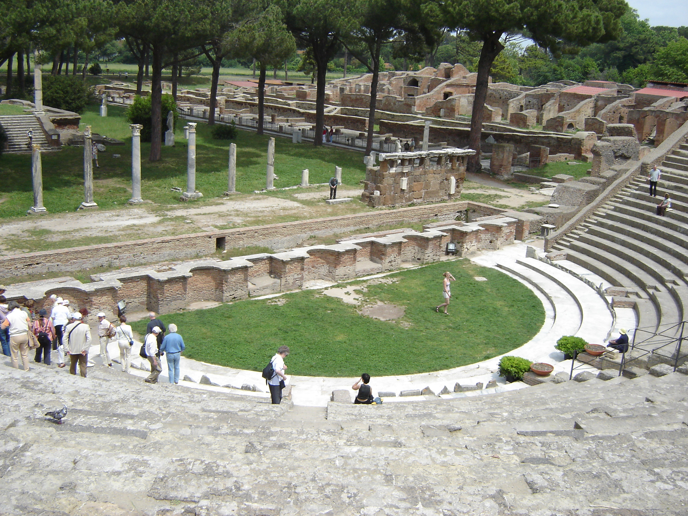 Ostia Antica